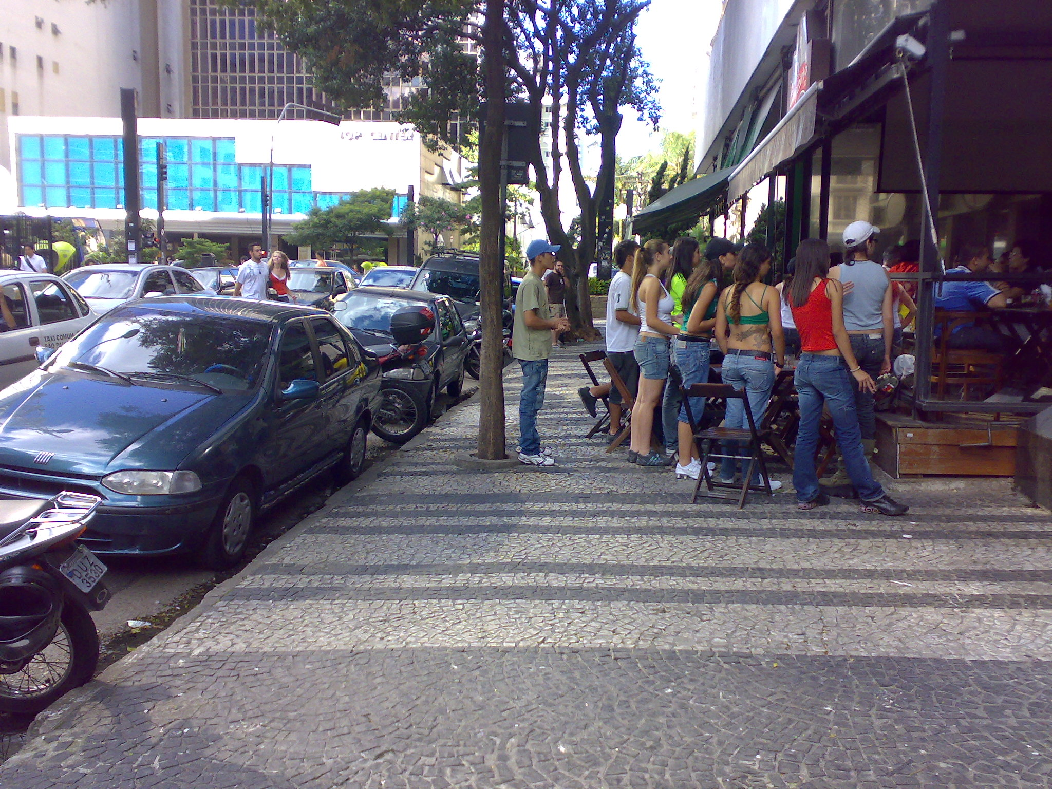 Portuguese pavement next to Paulista Av., São Paulo.